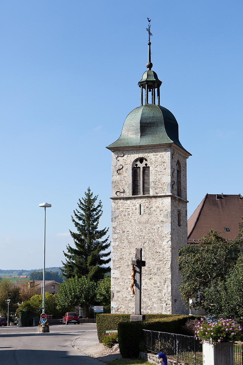 Tour de l'ancienne église à Semsales (FR)